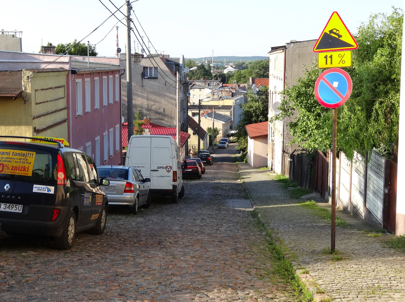 Ulica Różana na osiedlu Wilczak w Bydgoszczy